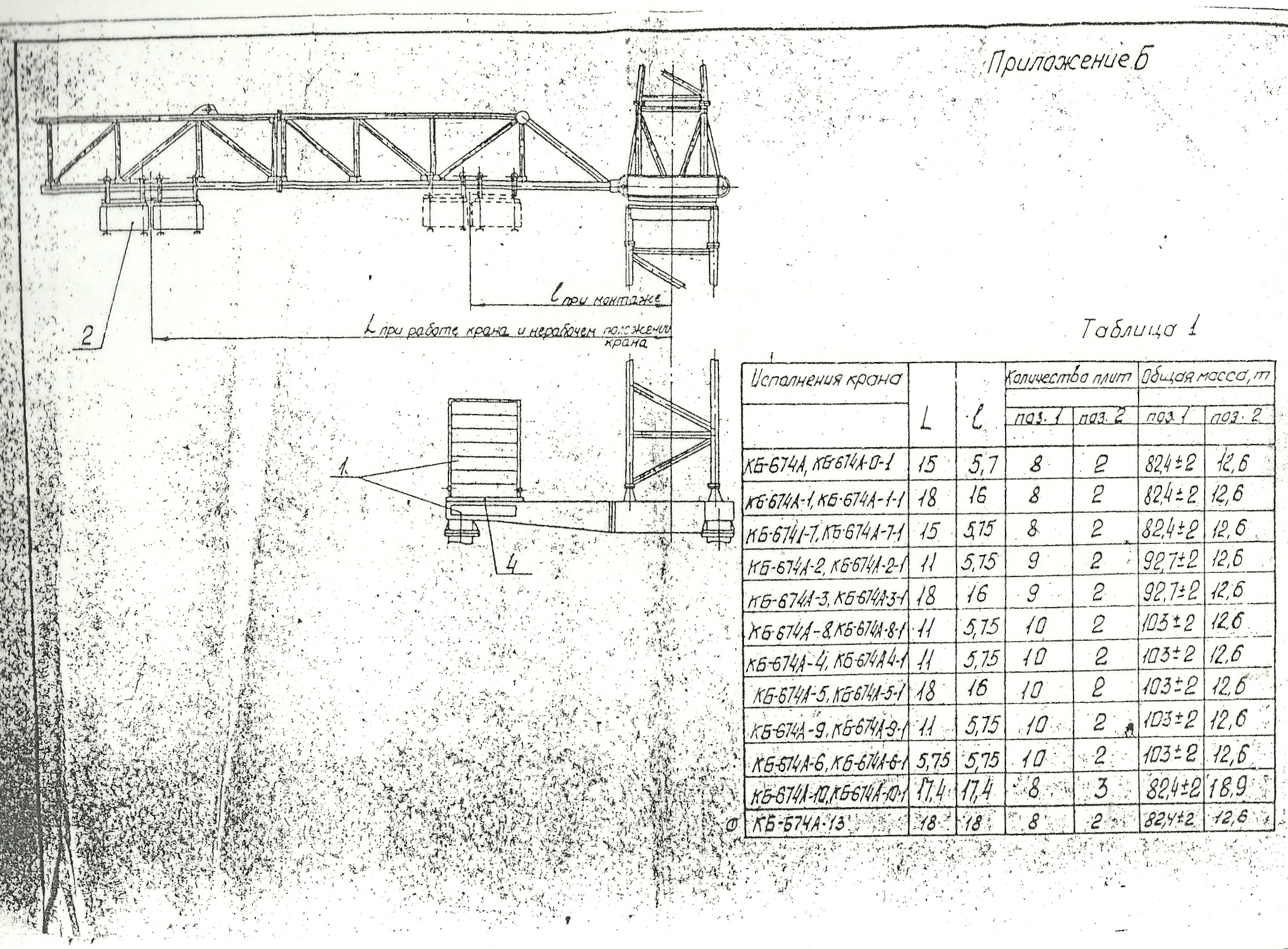 Annex Table 1